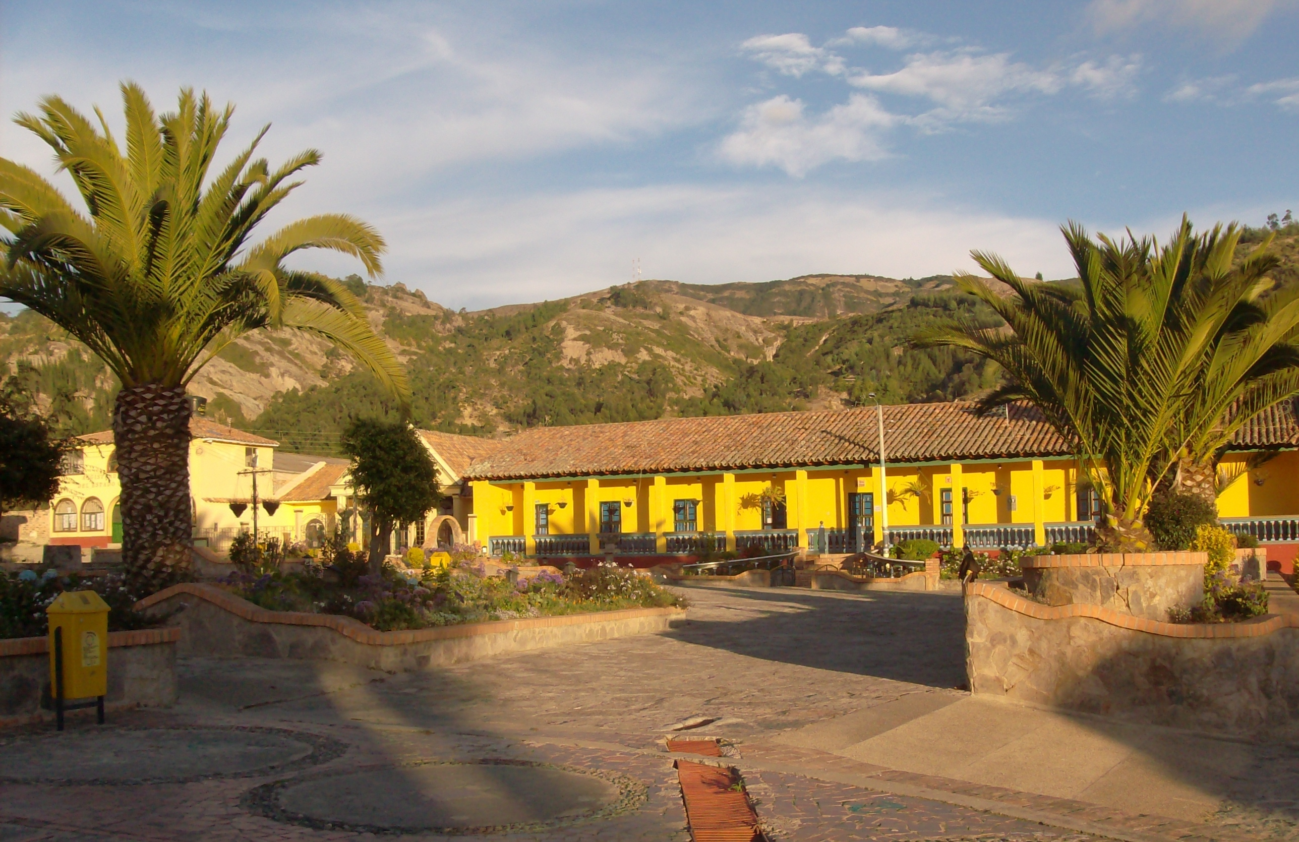 Parque principal del municipio.